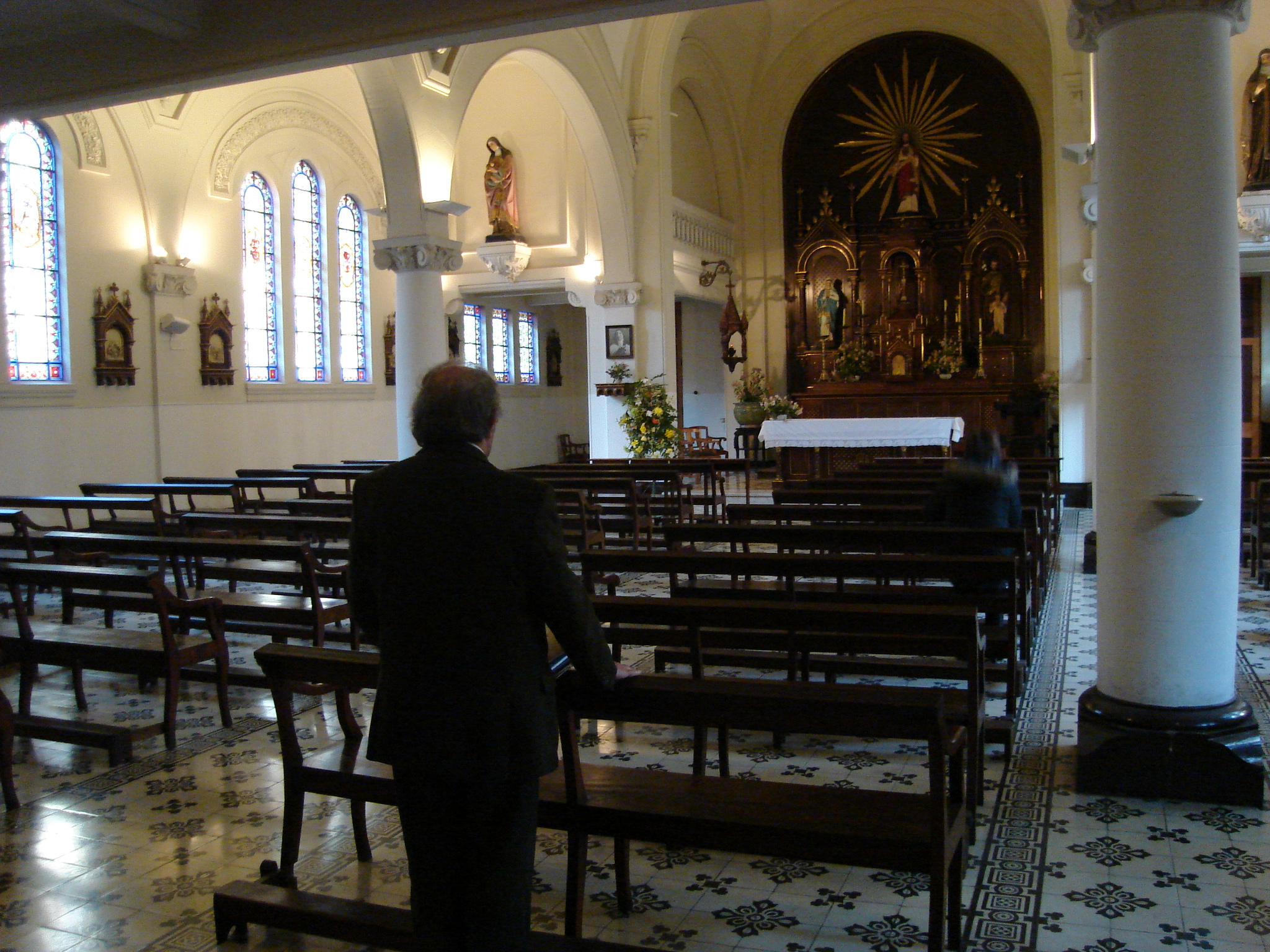 Casa Central de la Universidad Católica de Valparaíso This is a photo of a national monument in Chile: 575